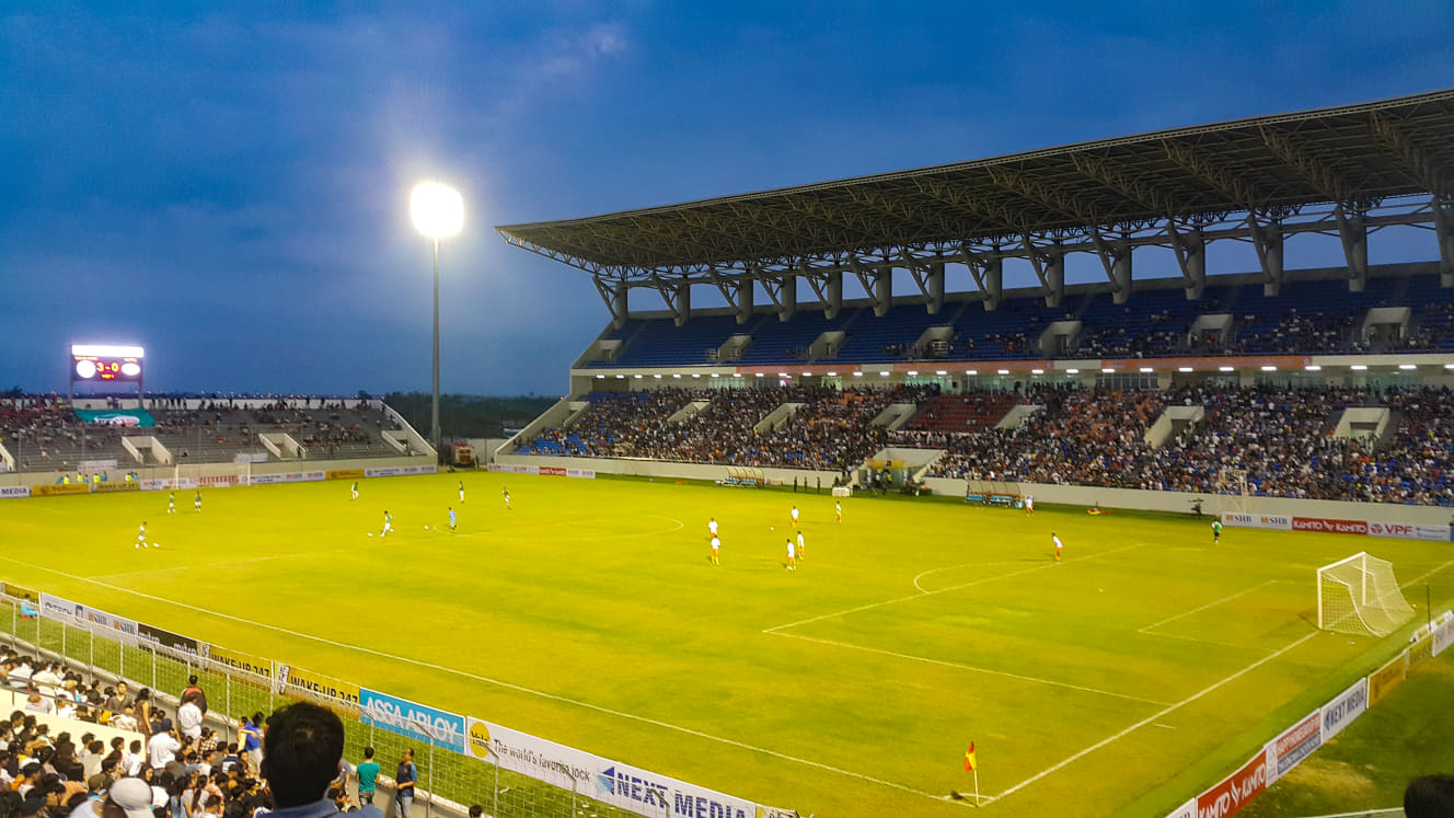 toàn cảnh sân Hòa Xuân trong 1 trận đấu